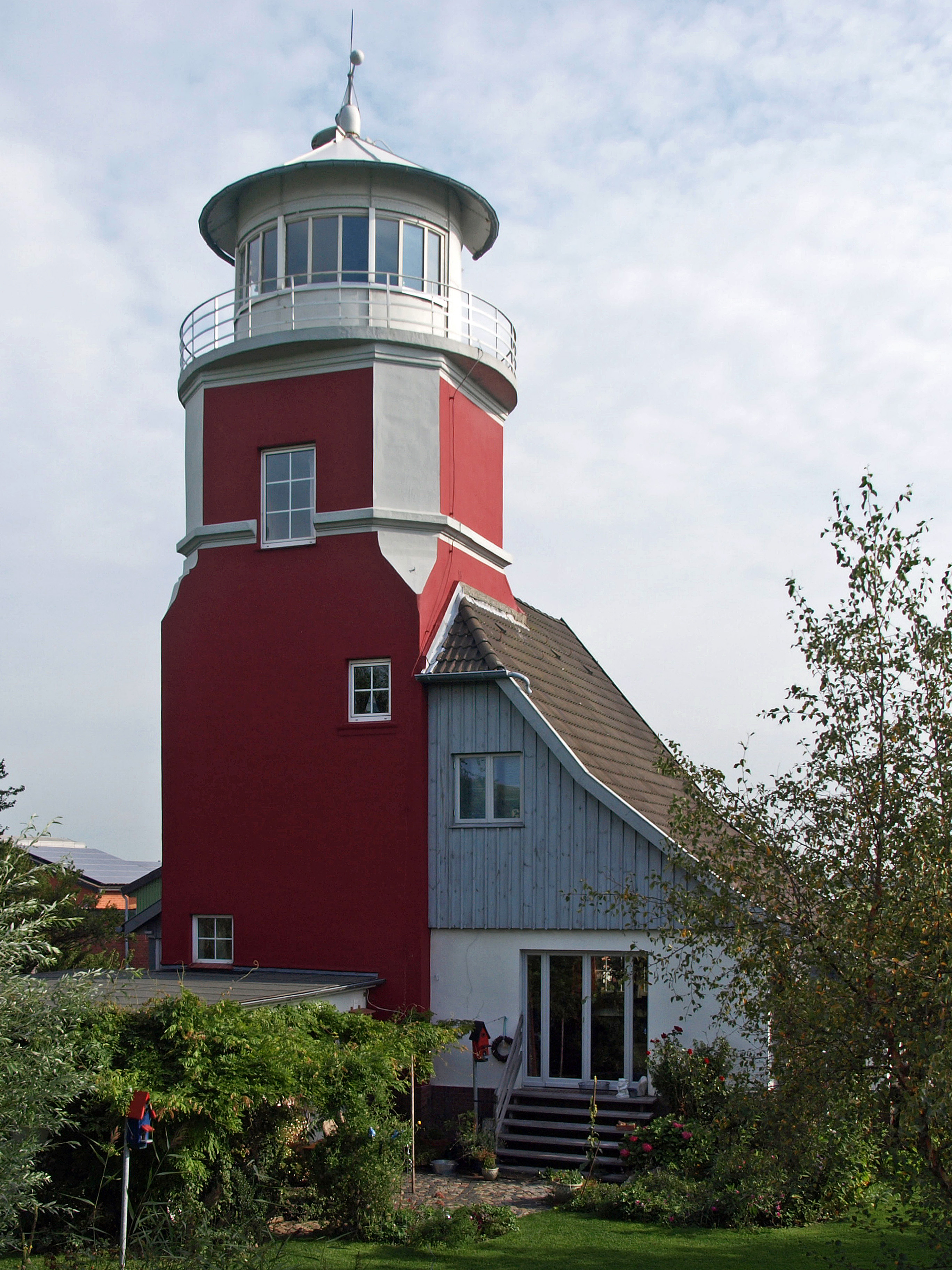 der alte Leuchtturm in Hollerwettern in Betrieb von 1911 bis 1982